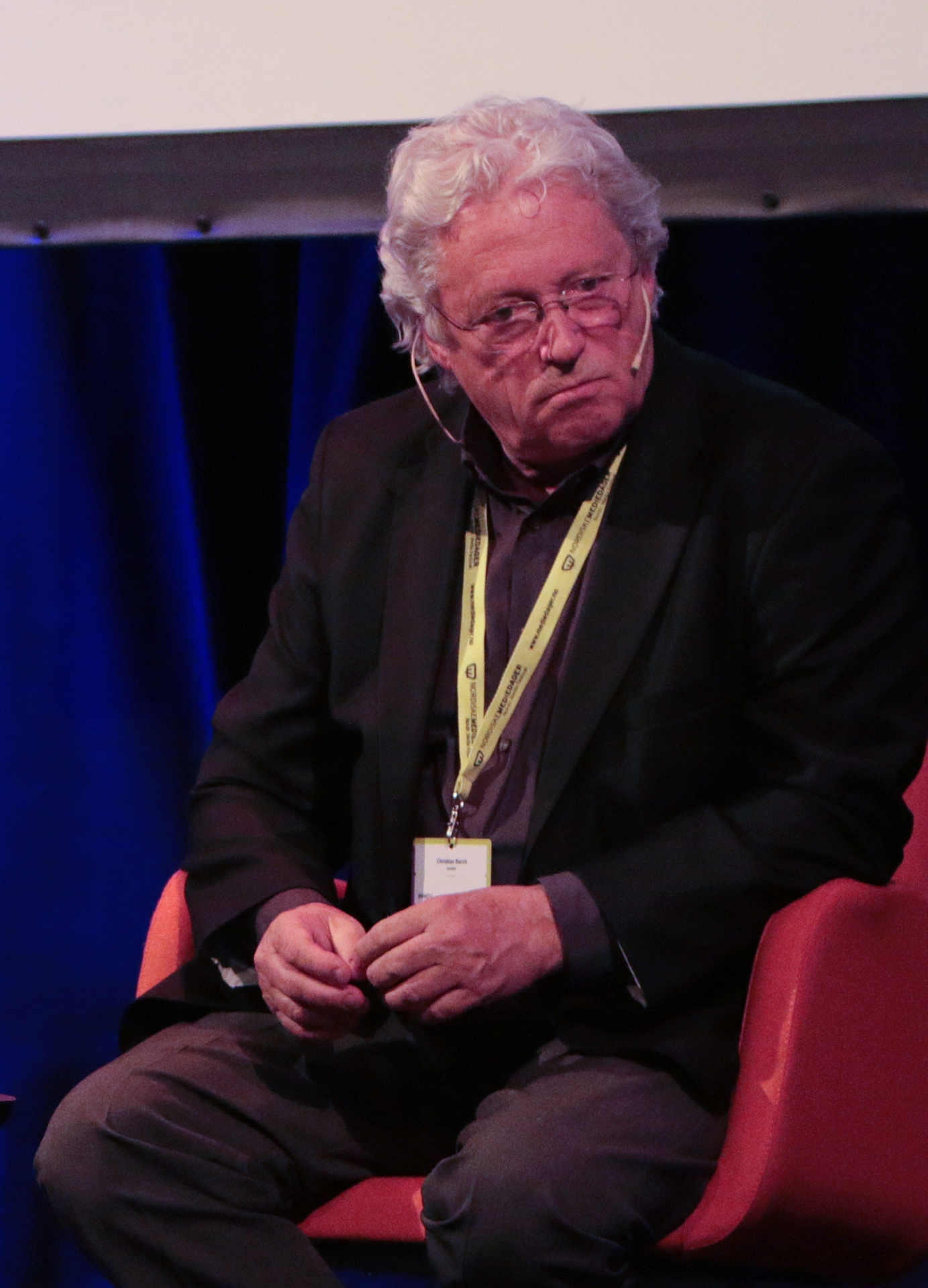 Rådgivere: Thomas Giertsen fra Feelgood TV, Silje Sandmæl fra DNB / Luksusfellen (TV3), Christian Borch. Programleder: Siri Kristiansen fra NRK P3